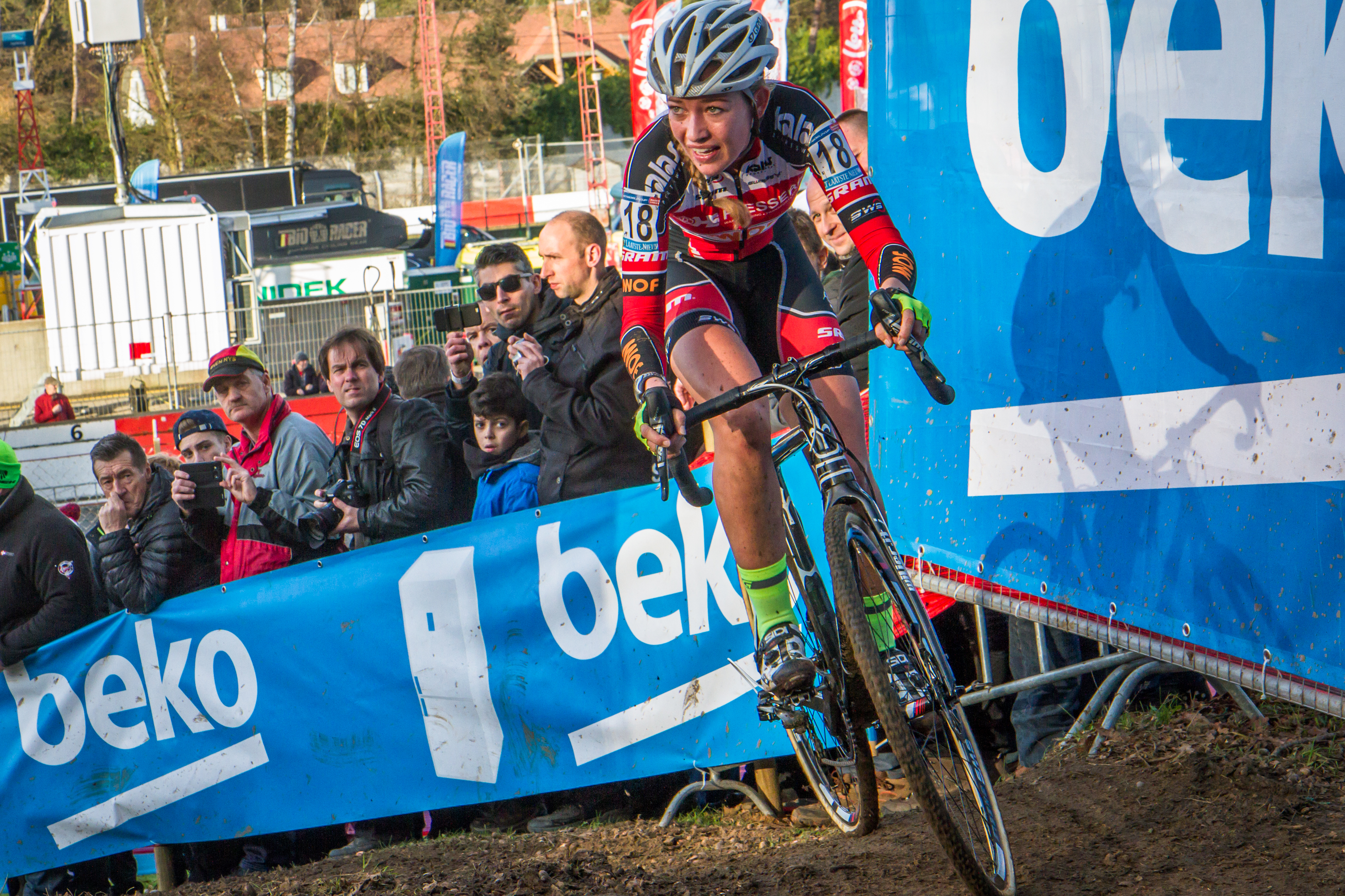 Sophie de Boer (NED) Kalas-NNOF. UCI Cyclocross World Cup, Heusden-Zolder, Belgium, 2015.